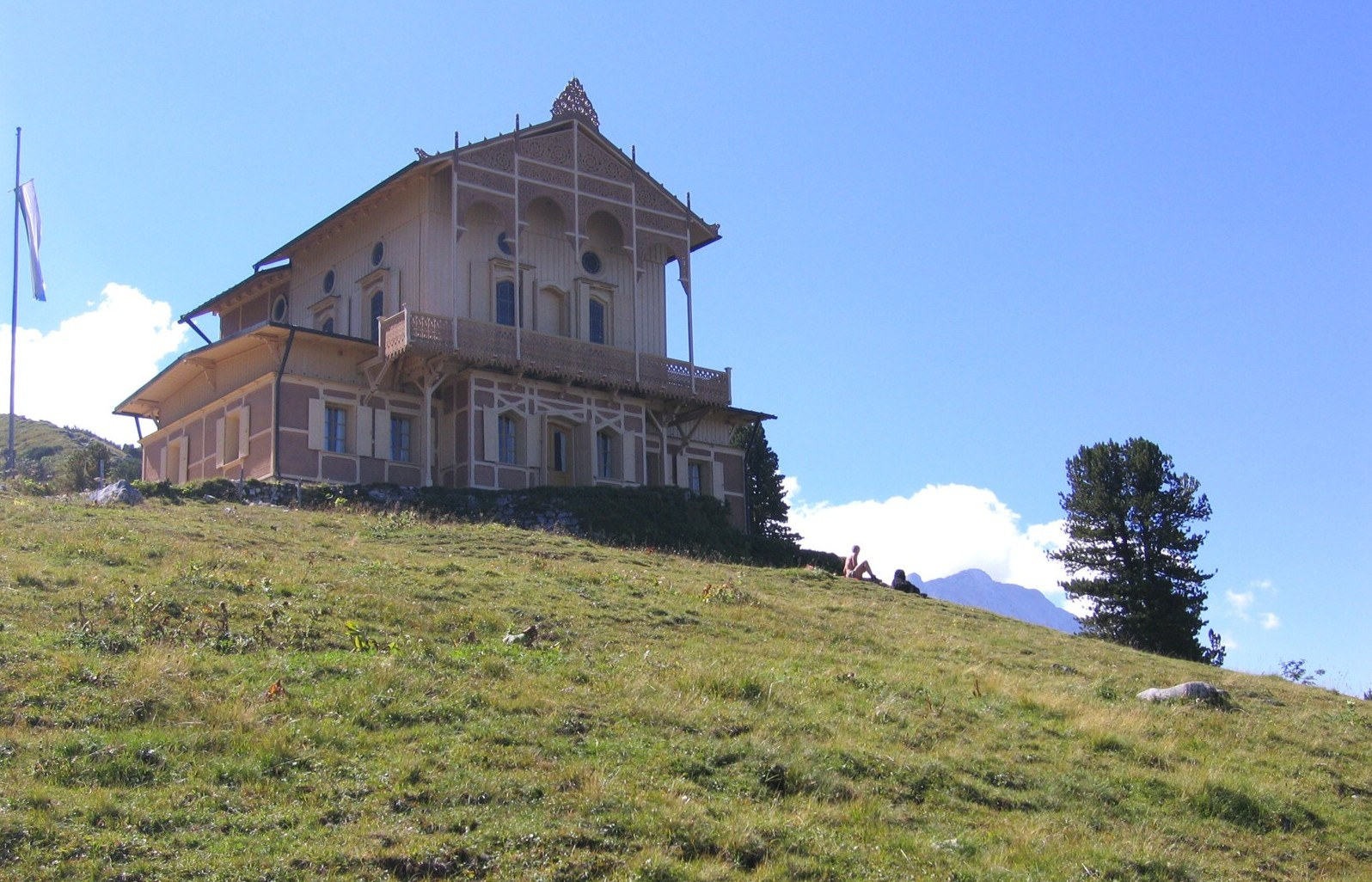 Königshaus am Schachen is a royal hunting lodge on Mount Schachen in Bavaria, Germany